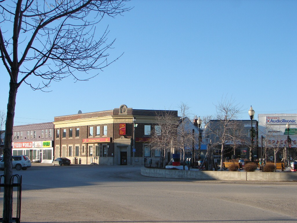 Circle Road in Kapuskasing, Ontario, Canada